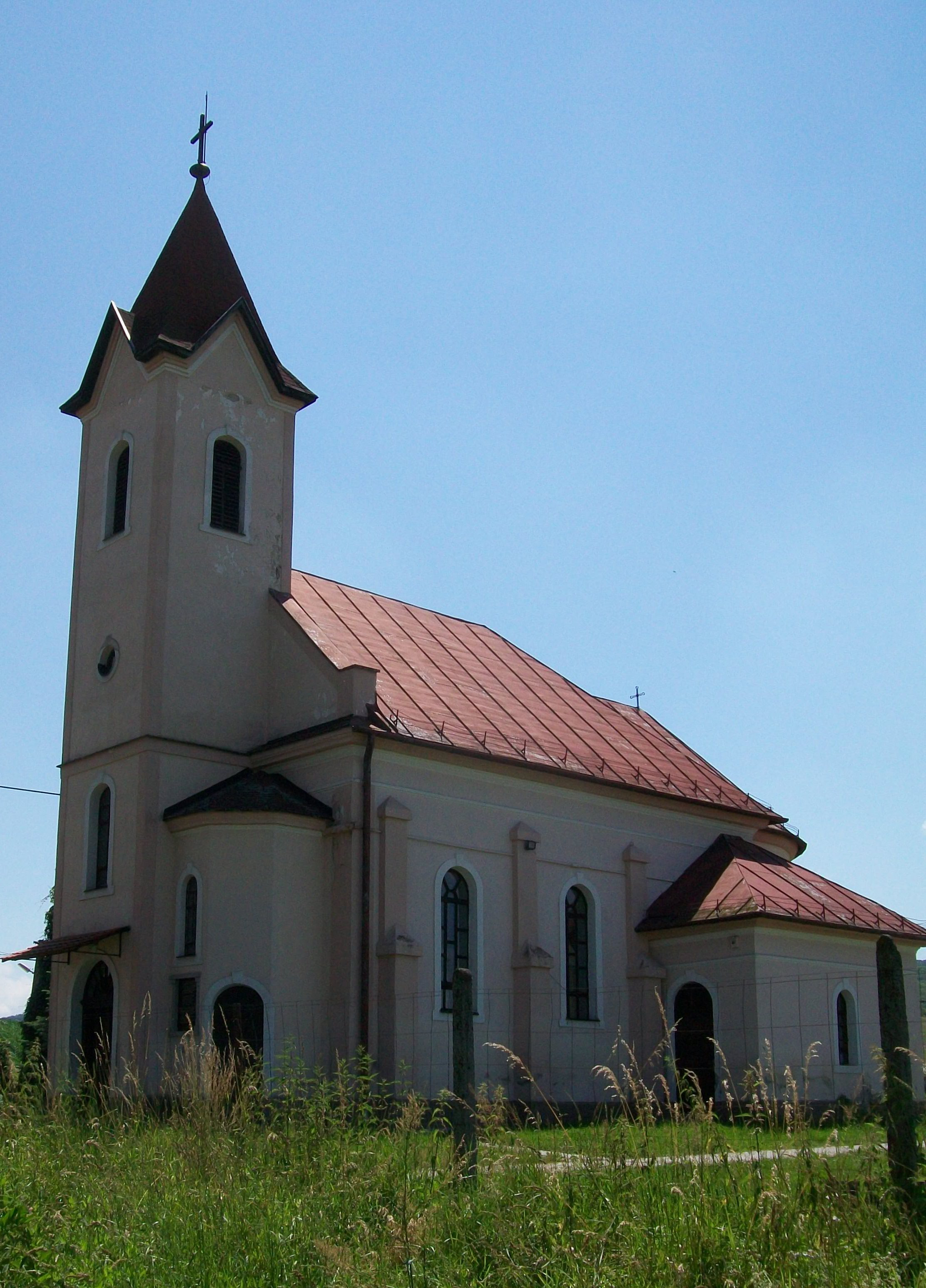 Rímskokatolícky kostol Najsvätejšieho Srdca Ježišovho v obci Muľka